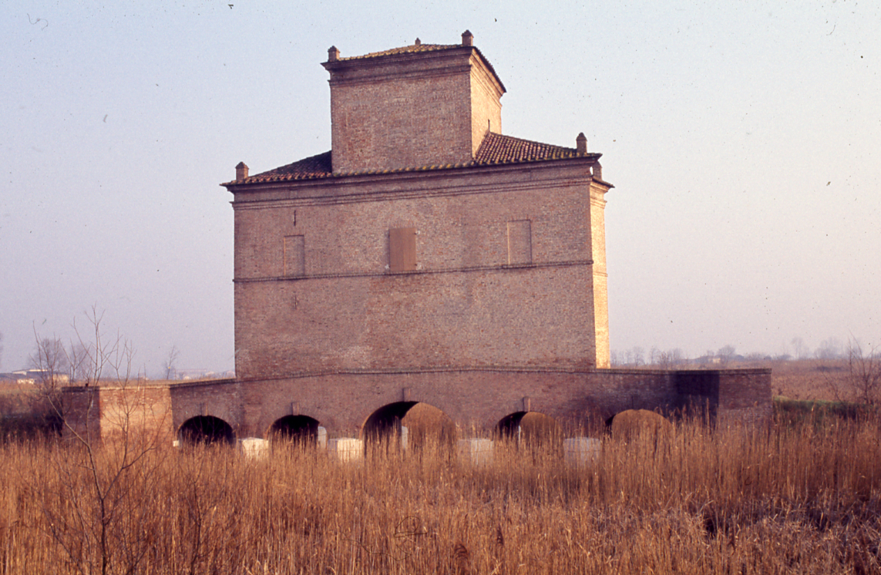 Servizio fotografico : Italia, 1975 / Paolo Monti. - Foglio: 1, Fotogrammi complessivi: 3/20 : Diapositiva, sviluppo cromogeno/ pellicola ; 35 mm. - ((Le diapositive nn. 01-05; 07-08; 9; 11-18 e 20 costituiscono altre serie. - Confronti con negativi (b/n - gelatina bromuro d'argento/ pellicola - 35mm) e diapositive. - Occasione: Realizzazione audiovisivo Regione Emilia-Romagna. - Fonte: Rubrica di Paolo Monti: Diapositive 24x36mm (1948-1982), presso Archivio Paolo Monti. Rubrica con elenco soggetti e numeri di inventario (da 1 a 1000) corrispondenti ai fogli a tasche in pvc in cui sono contenute le diapositive. - Fonte: Carta sciolta di Paolo Monti: VII. Miscellanea 1/ Ferrara/ Monti - Incassi e pratiche da trattare/ Centro storico Ferrara - Arch. Cesari, Arch. Pastore/ Negative in bianco-nero di Ferrara e del suo territorio (1976/00/00), presso Archivio Paolo Monti. Territorio: n. 1000 negative circa relative alla campagna fotografica eseguita nel periodo dicembre '74-febbraio '75 [...] - Mesola, Valli di Comacchio, Verginese, Belriguardo, Copparo, Pomposa, Chiaviche, Bonifiche, La Stellata, Cento etc. - Fonte: Monografia: Territorio ferrarese: un programma di governo della Regione e delle autonomie locali, catalogo della mostra, Ferrara 1975, a cura di Roberto Fregna, Modena, Soc. Immobiliare & Poligrafica emiliana (1975). - Fonte: Fattura di Paolo Monti: IV. Commesse/ Fattura n. 16/ Diapositive per audiovisivo Regione Emilia-Romagna (1973/10/22), presso Archivio Paolo Monti. N. 1000 diapositive a colori formato 35mm sugli aspetti del patrimonio naturale, artistico e culturale della Regione. Dal territorio di Parma e Piacenza, fino a Ravenna e oltre, compreso il ferrarese e il Delta del Po, gli Appennini [...]